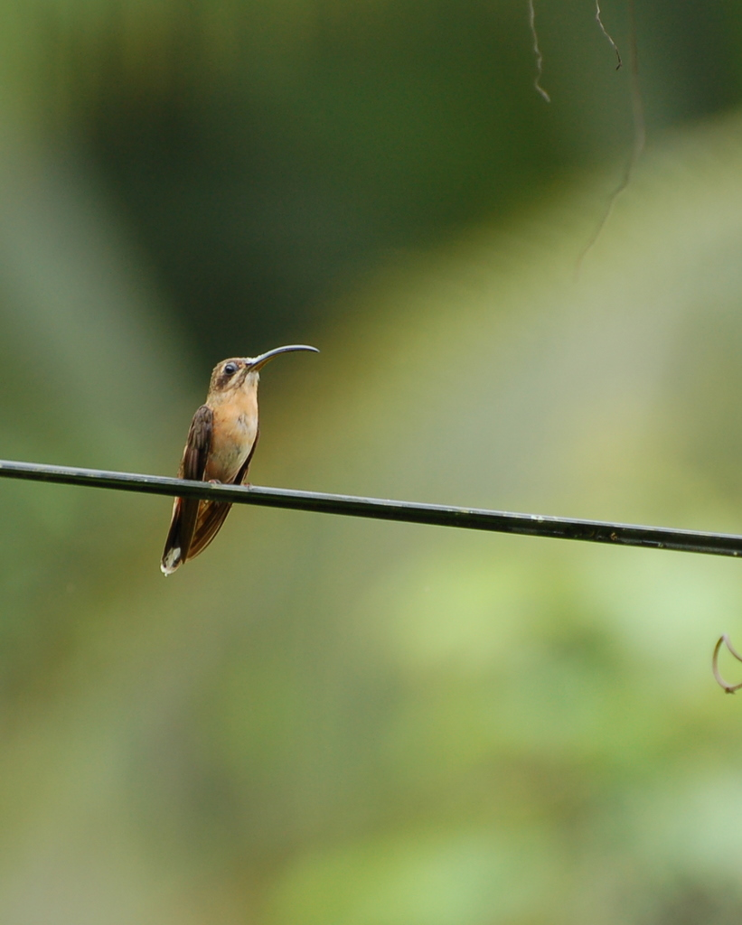 Manzanillo, Costa Rica